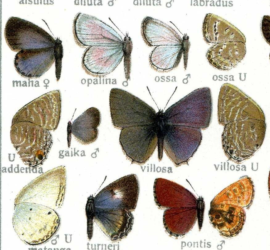 gaeka